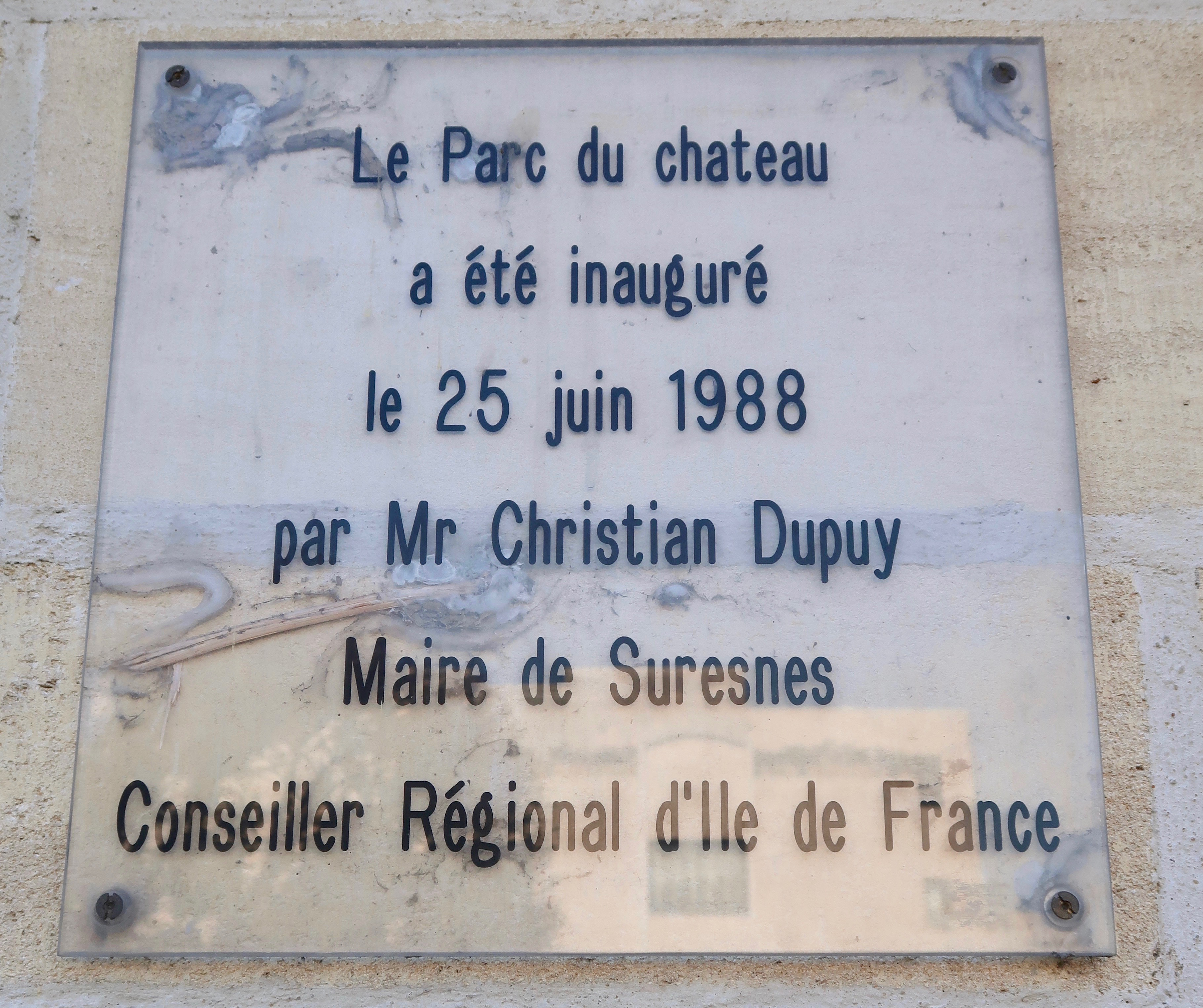 Plaque du parc du château à Suresnes (Hauts-de-Seine), inauguré par Christian Dupuy en 1988.